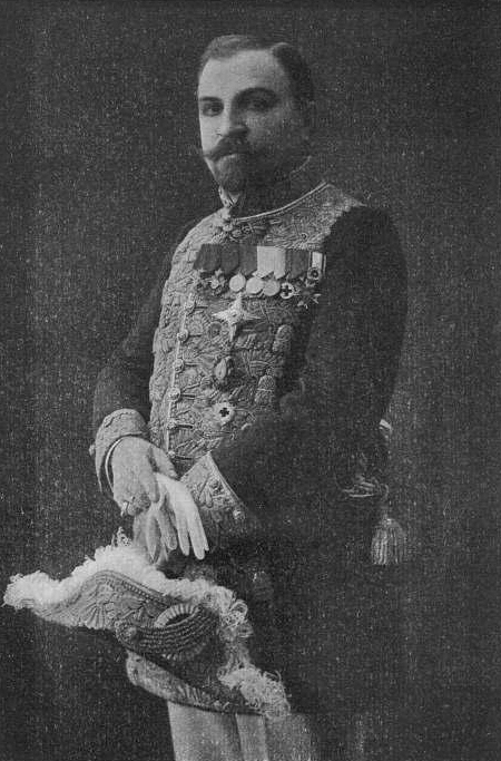 Камергер Александр Степанович Гижицкий в придворном мундире.